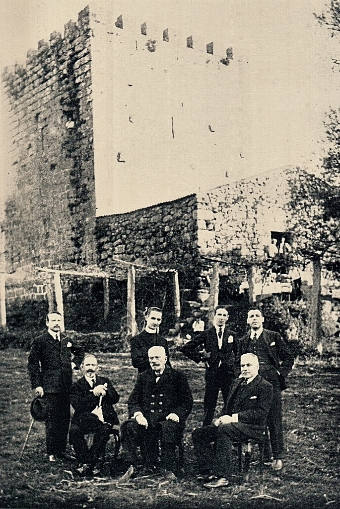 Da esquerda para a direita – sentados: João Gomes de Abreu de Lima, Conde de Bertiandos e Francisco de Abreu Maia; em pé: António de Magalhães (Visconde de Cortegaça), Padre Araújo Calheiros, Conde de Aurora e António Ferreira. Fotografia tirada junto à Torre de Refoios de Lima, em 22 de Novembro de 1922